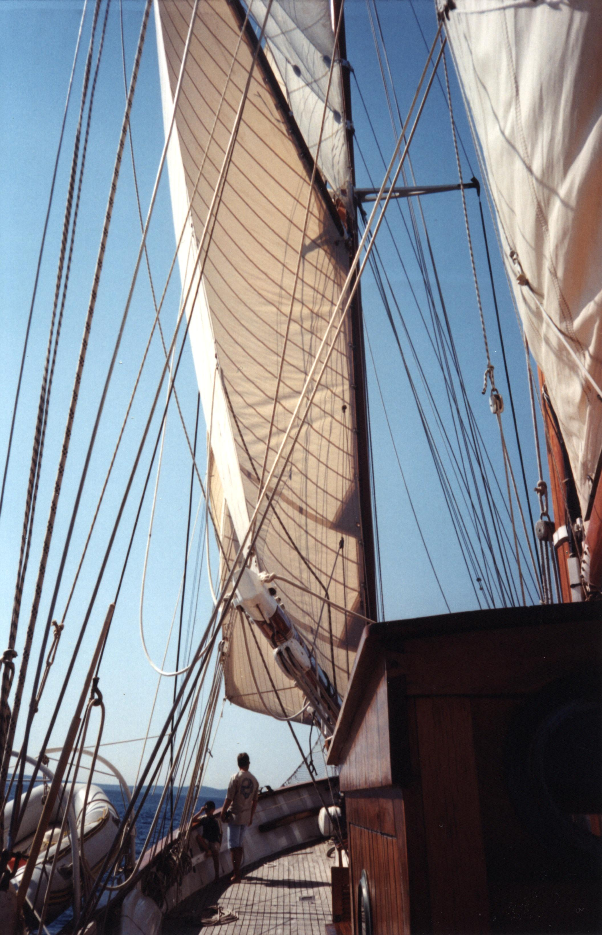 Le navire Hoëdic, ancien thonier breton converti en bateau croisière/promenade au départ du Lavandou, France.